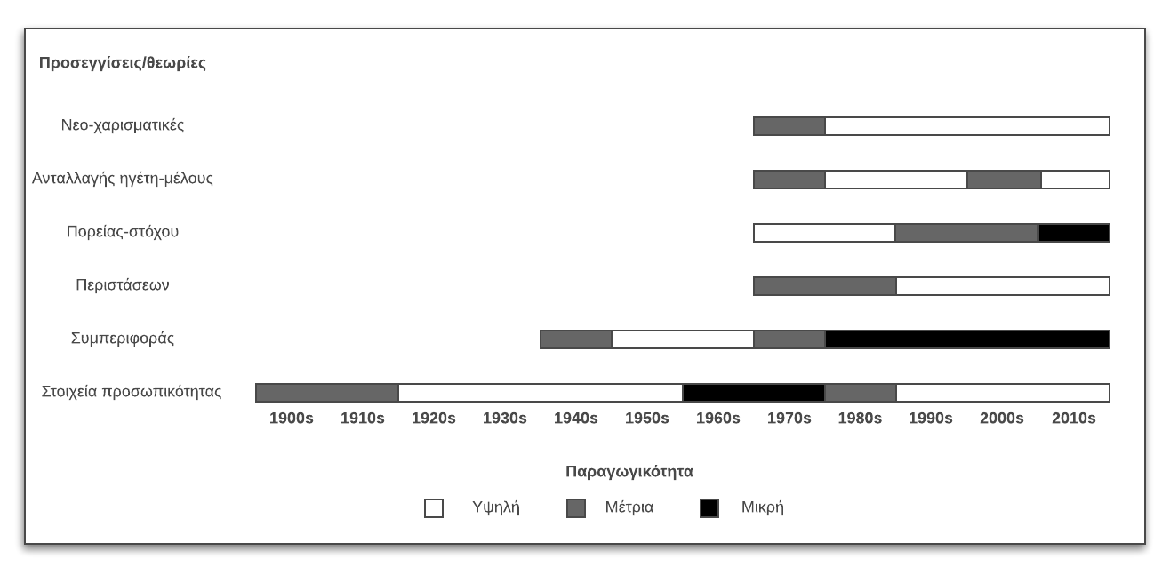 Ιστορική ανασκόπηση έρευνας στην ηγεσία (Αναπροσαρμογή από Day & Antonakis, 2012: 7)